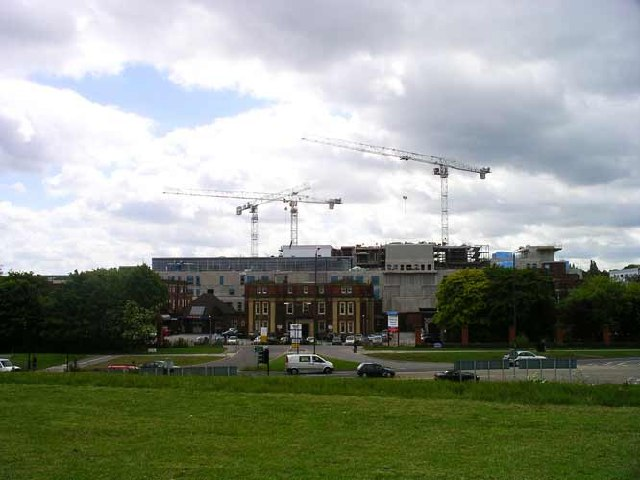 Super Hospital, Mickleover, Derby